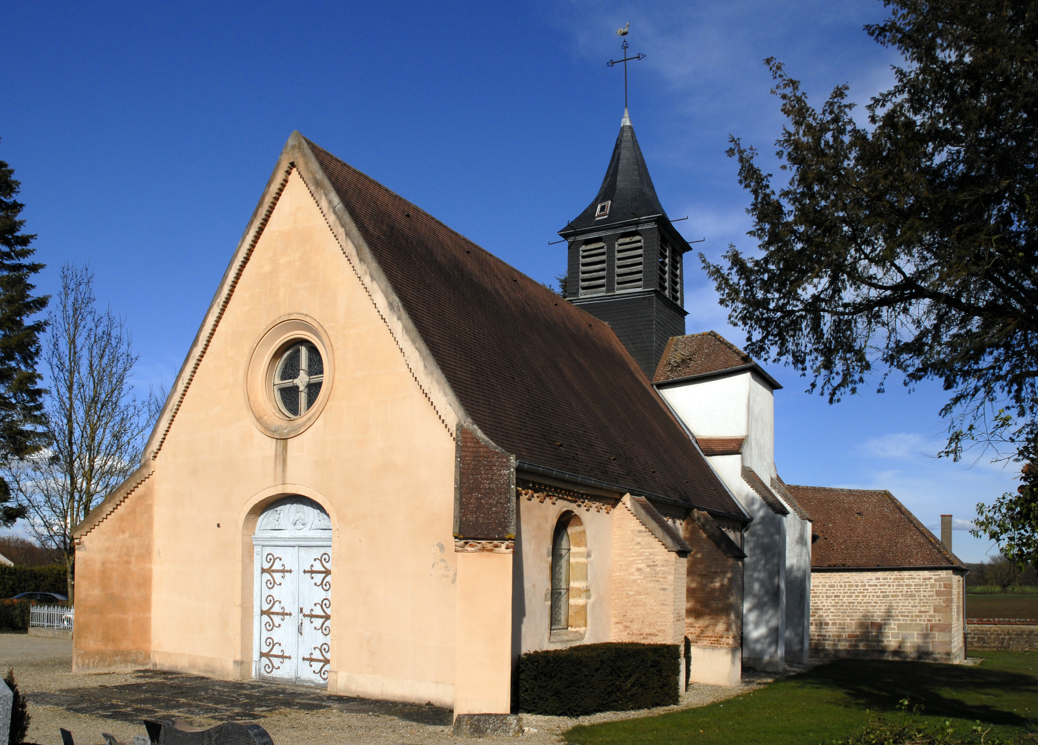 Eglise catholique Saint Vincent - 21110 Soirans France